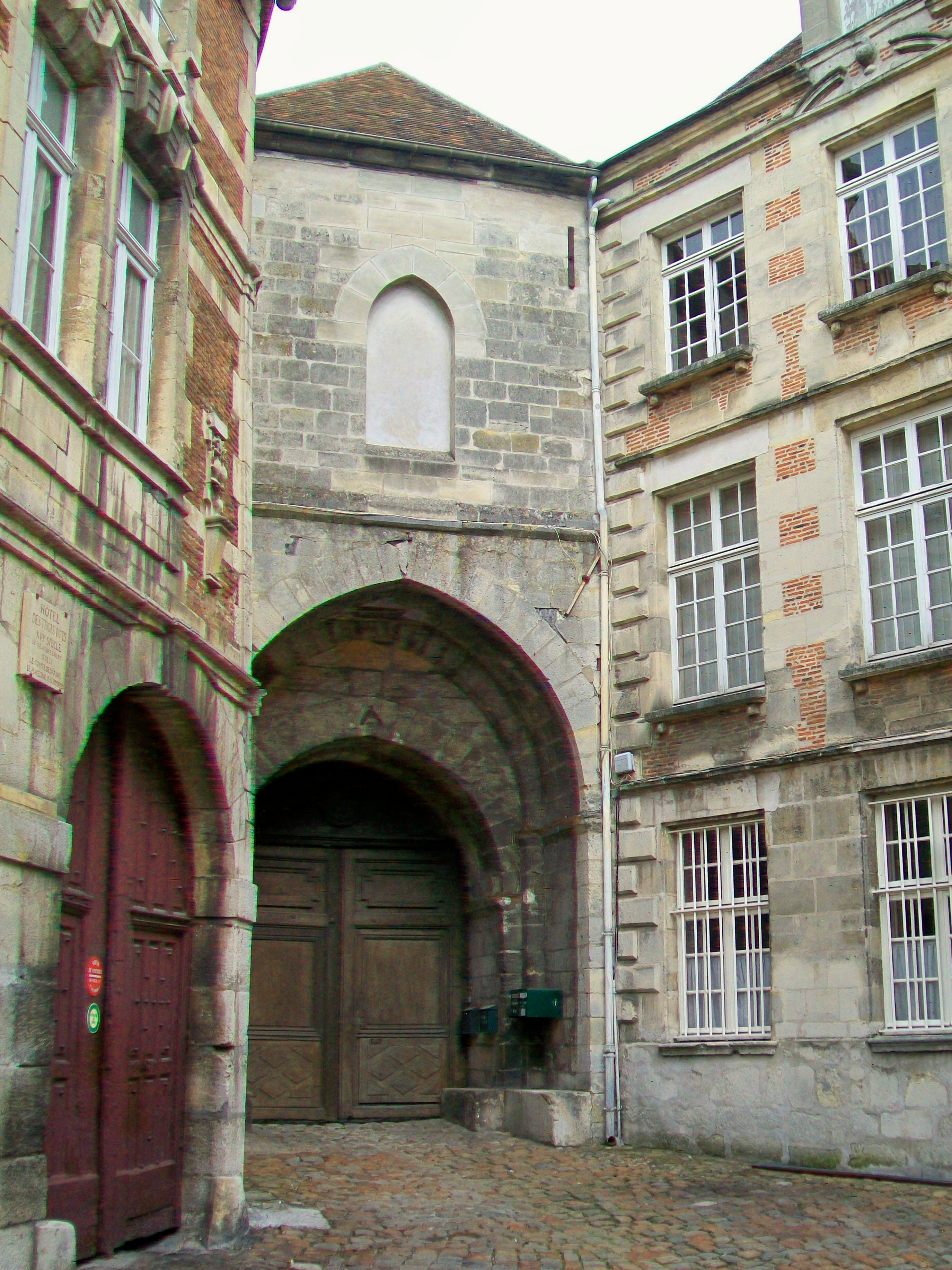 La porte fortifiée du château royal, façade vers la rue du Châtel, XIIIe siècle.